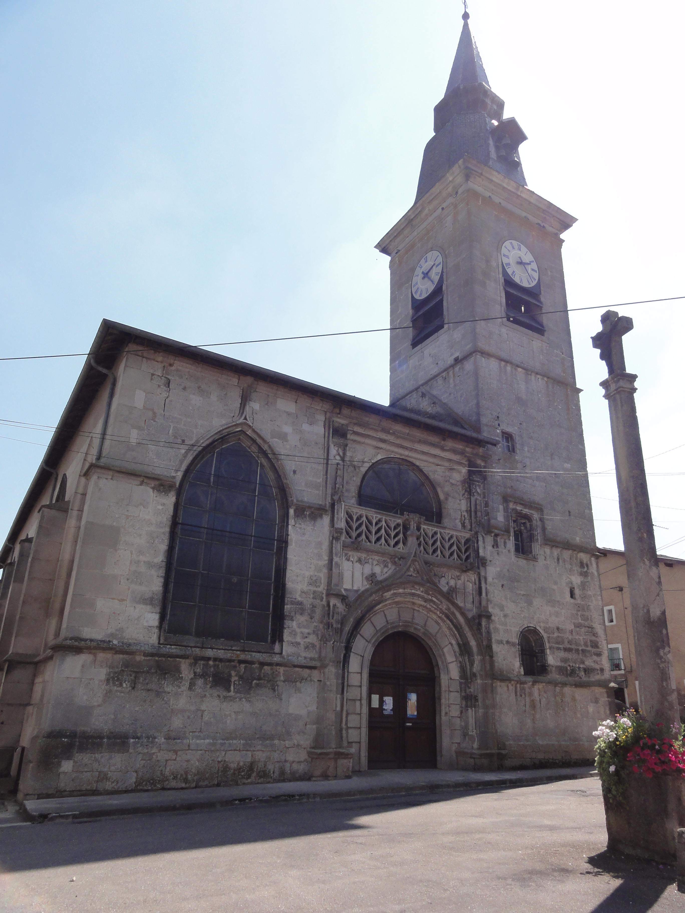 Sampigny (Meuse) église